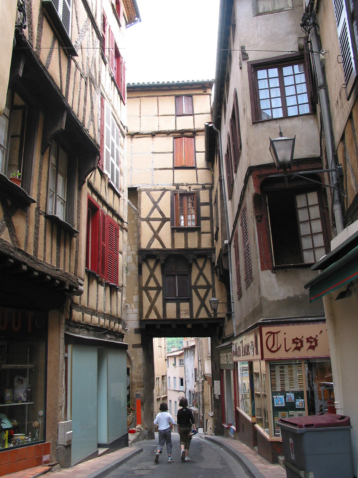 Thiers (Puy-de-Dôme) (France), rue du Pirou - La "Pedde" du Coin des Hasards (petit passage couvert) et ses maisons à colombages du XVIe siècle.